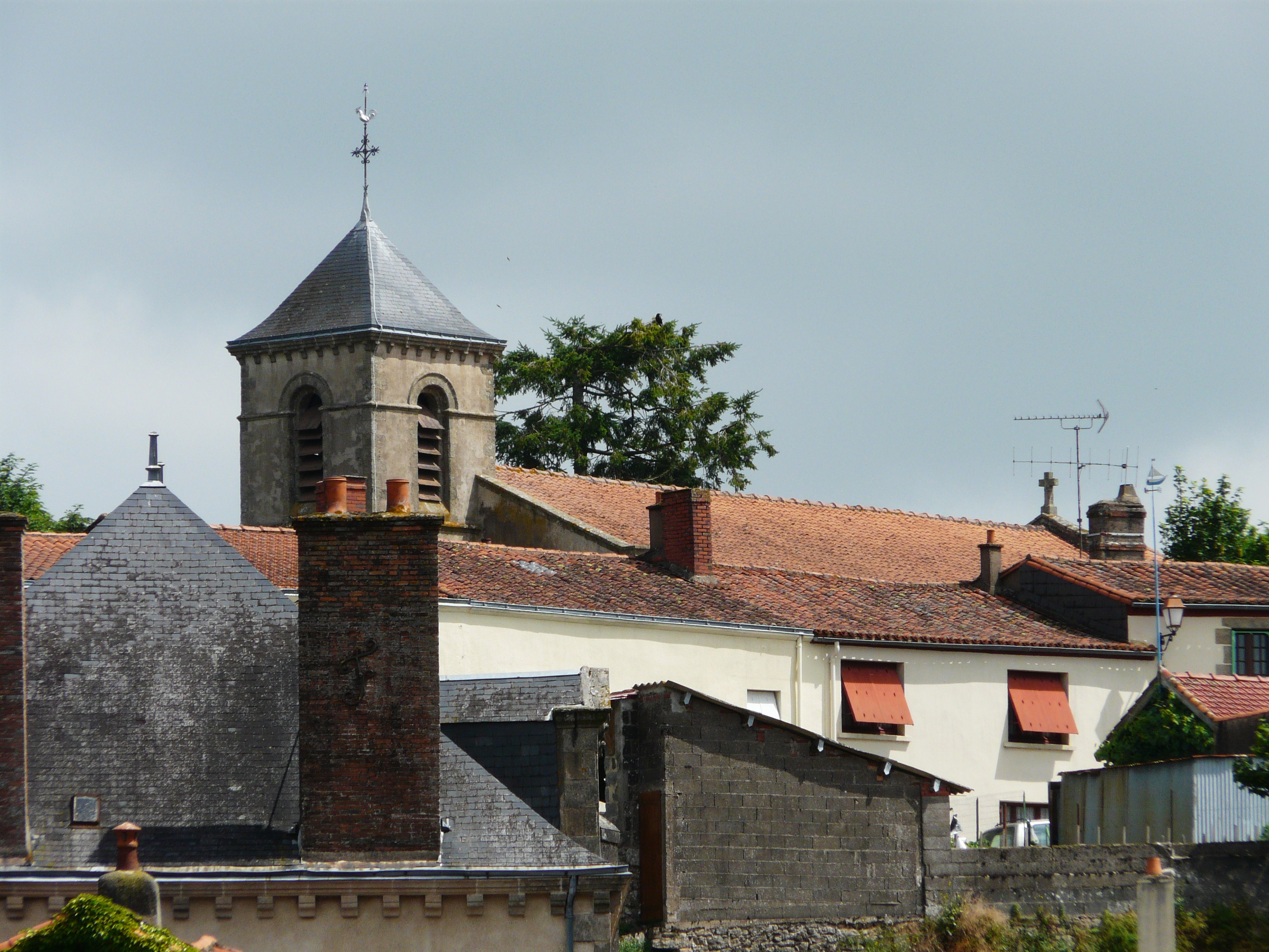 L'église de Mallièvre, Vendée, France